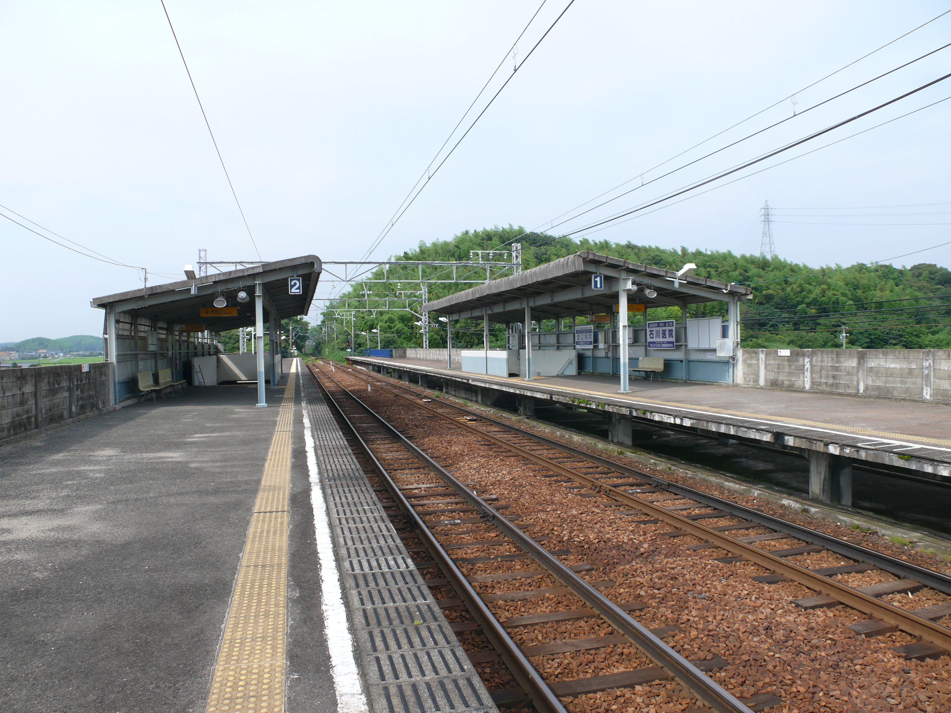 愛知県知多郡美浜町にある名古屋鉄道の野間駅